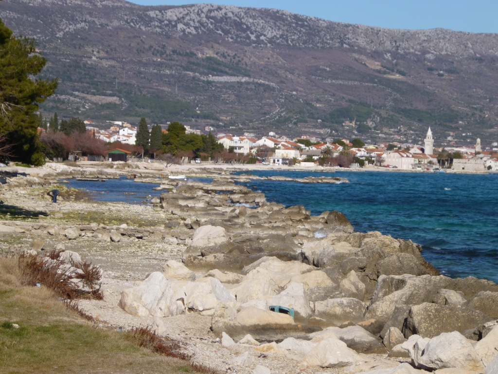 Bile, Kaštel Štafilić